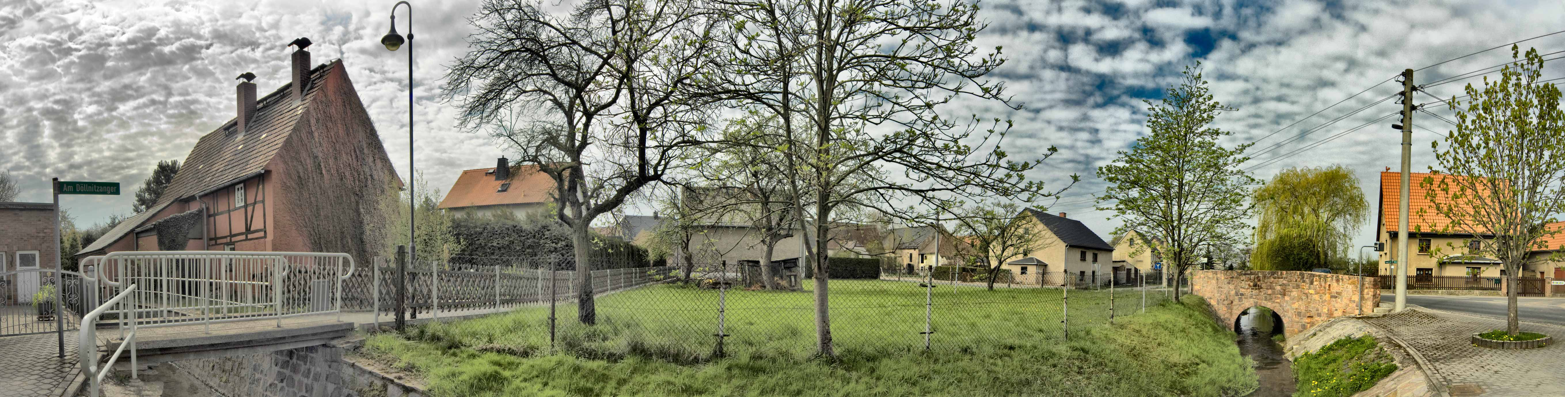 Ortspanorama an der Döllnitz, Ortsteil Liptitz, Gemeinde Wermsdorf, Sachsen